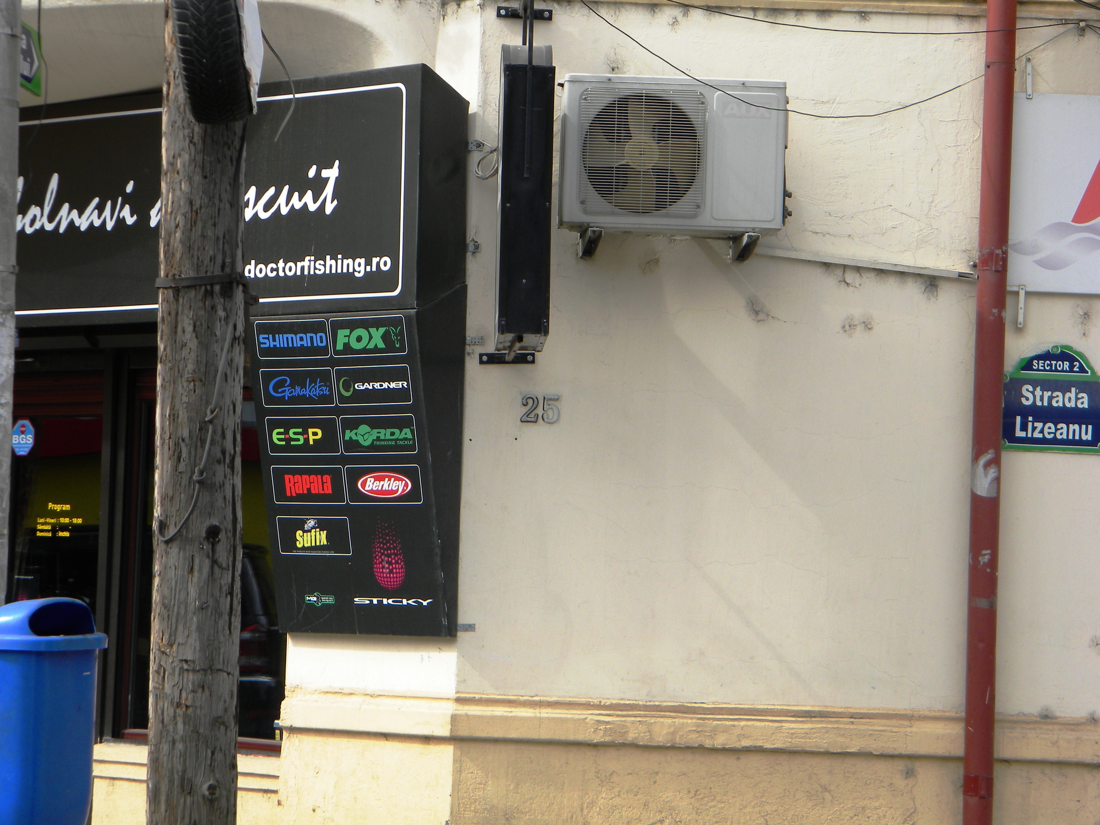 Bucuresti, Romania, Casa pe Str. Lizeanu nr. 25, sect. 2 (detaliu 2)